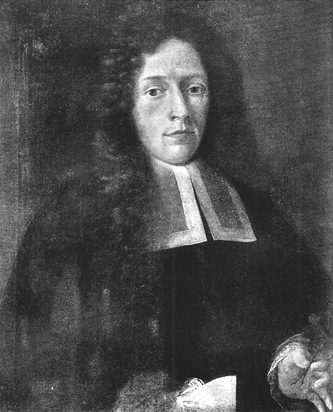 Prof. Rudolf Jakob Camerarius (Öl auf Leinwand, Tübinger Professorengalerie)